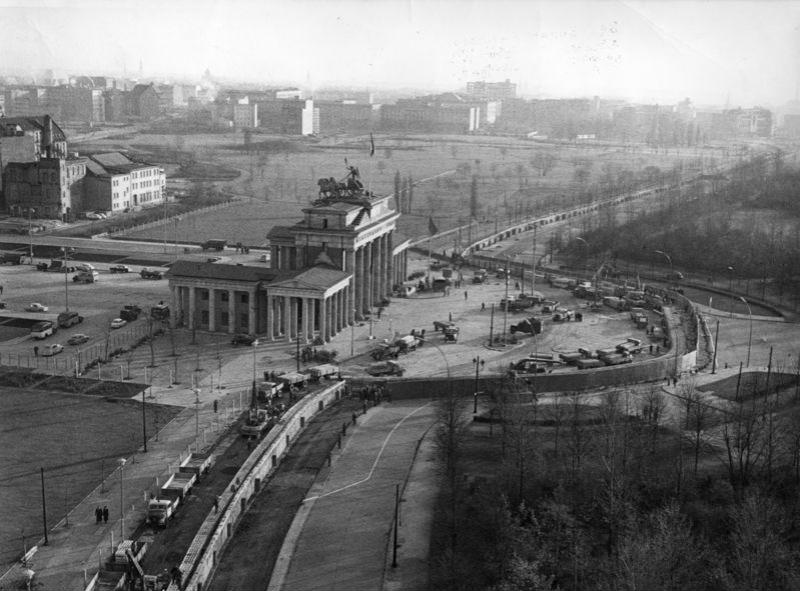 Im Bild: Schandmauer am Brandenburger Tor.